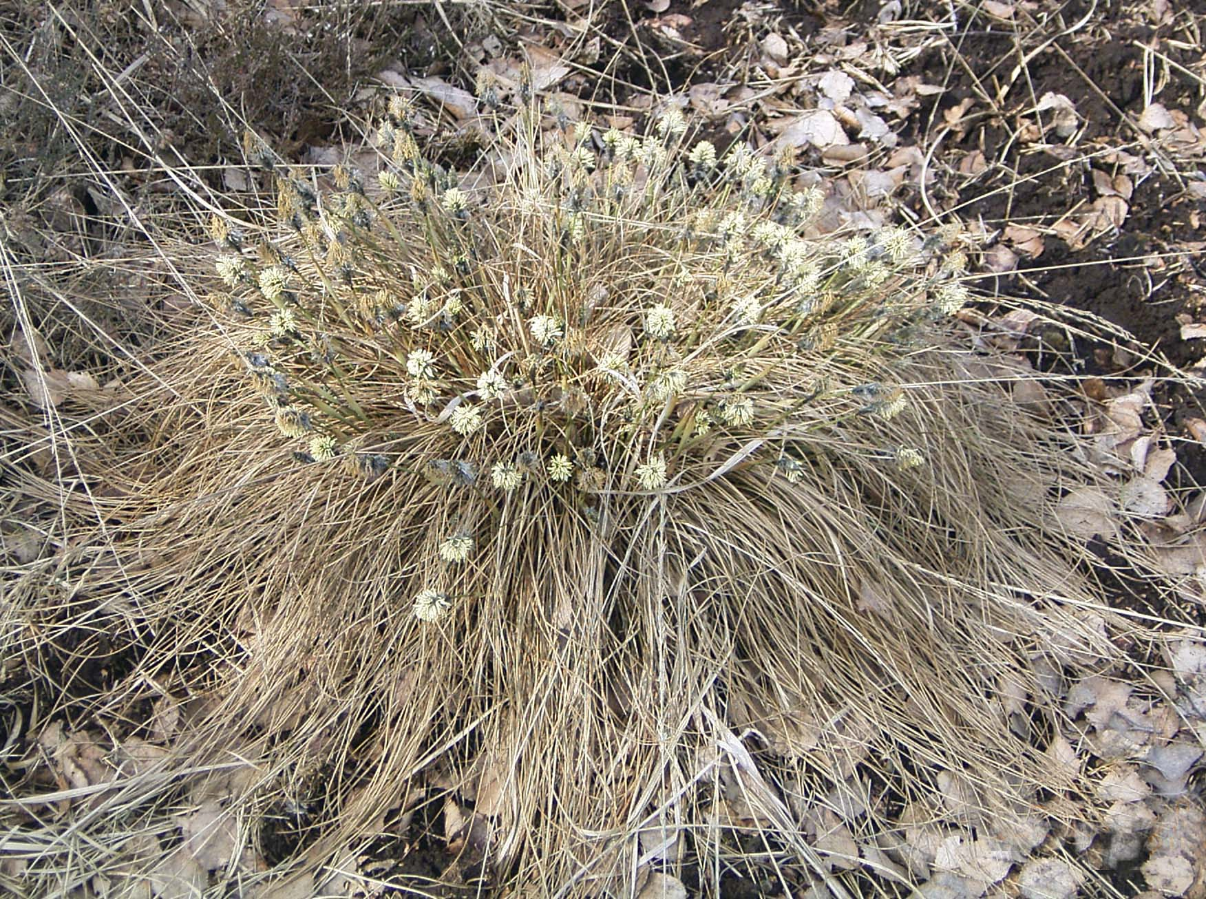 Horst des Scheiden-Wollgrases (Eriophorum vaginatum), NSG Molberger Dose (Niedersachsen)